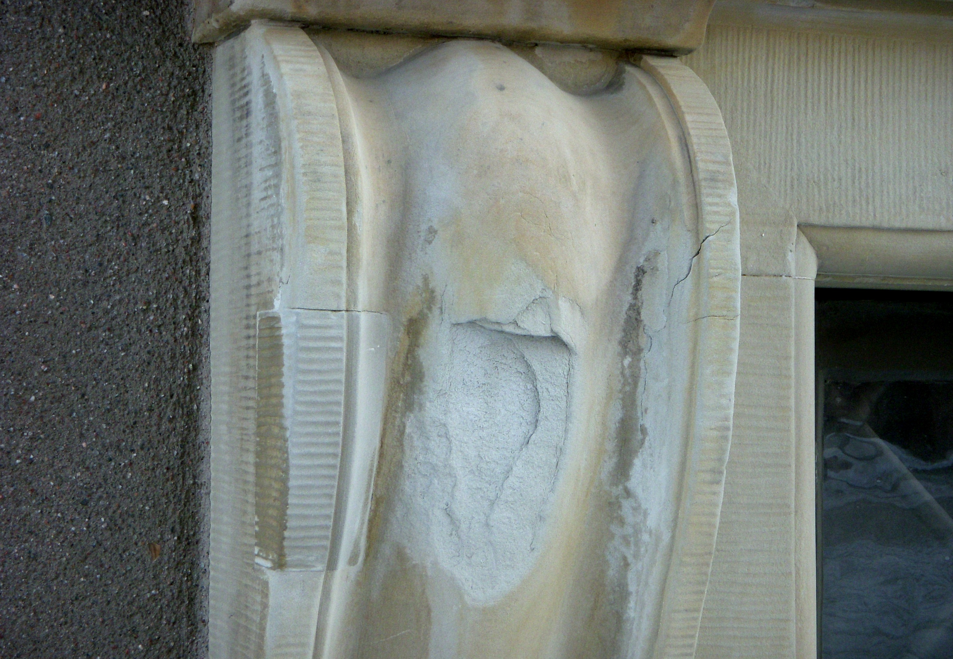 Stockholms slott, vittringsskada på en sandstenskonsol, västra fasaden